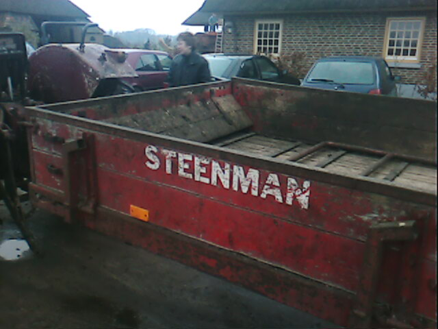 Steenman meststrooier, foto genomen te Zelhem (gld) in 2007